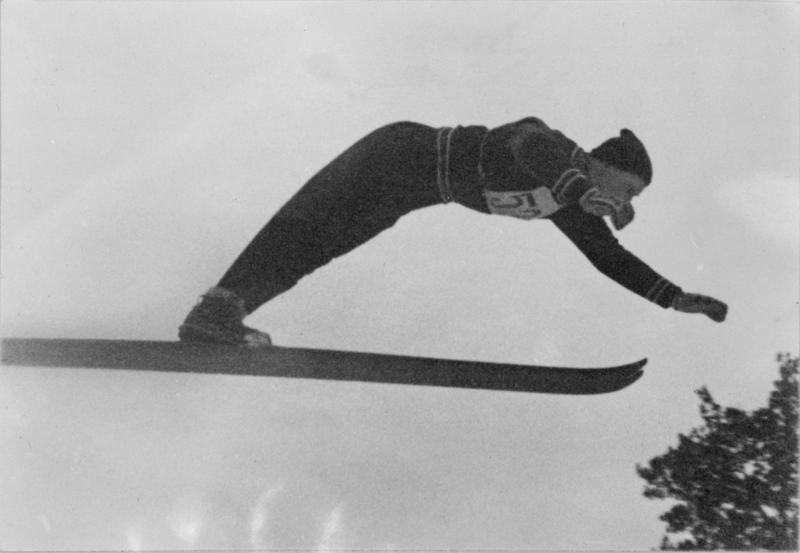 Norwegian ski jumper Torbjørn Falkanger, possibly in Trondheim